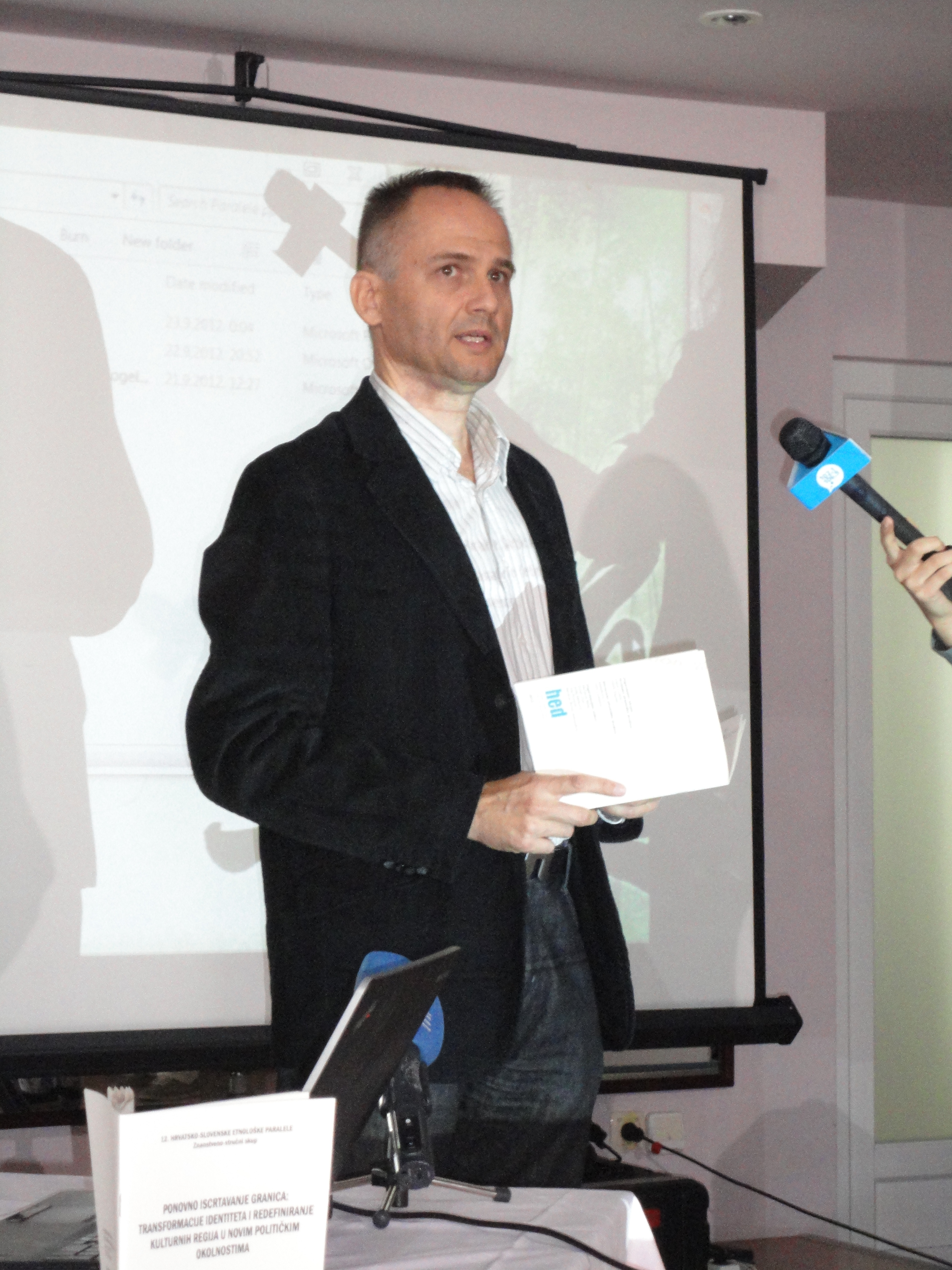 mr.sc. Zoran Čiča